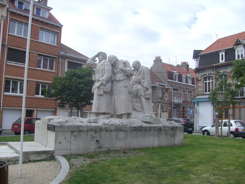 Place Delta à Malo-les-Bains, comportant le mémorial au mort.